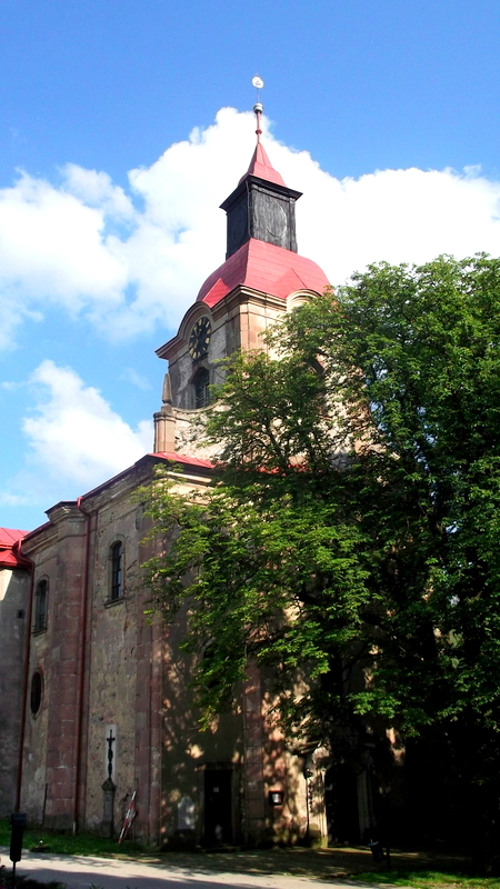 Kostel Nejsvětější Trojice (Žacléř), Žacléř